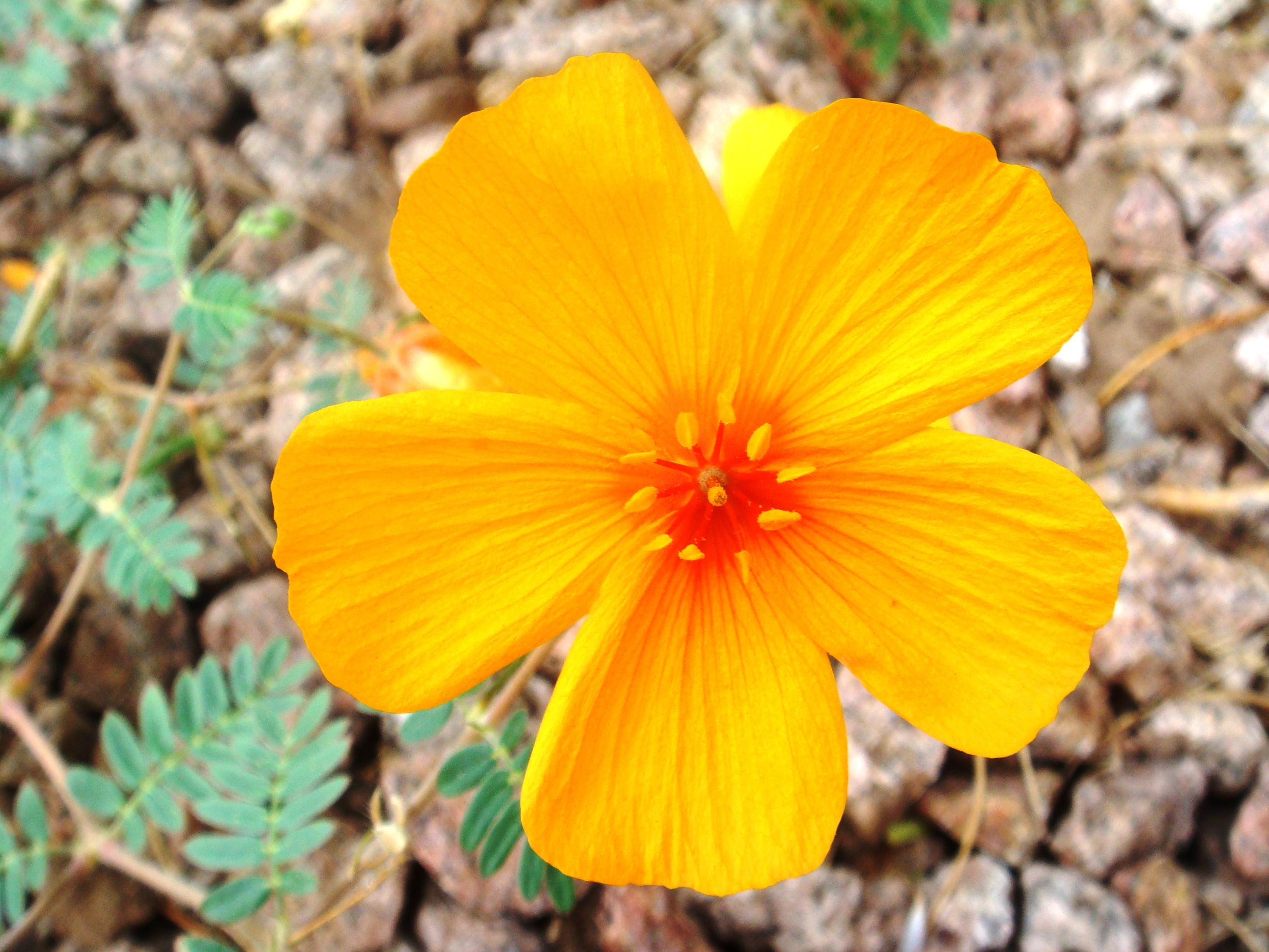 Kallstroemia grandiflora, Arizona State University, Tempe, Arizona